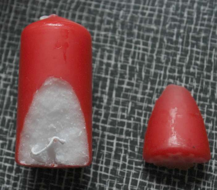 svíčky adventní červené, poškození při nasazování na hrot